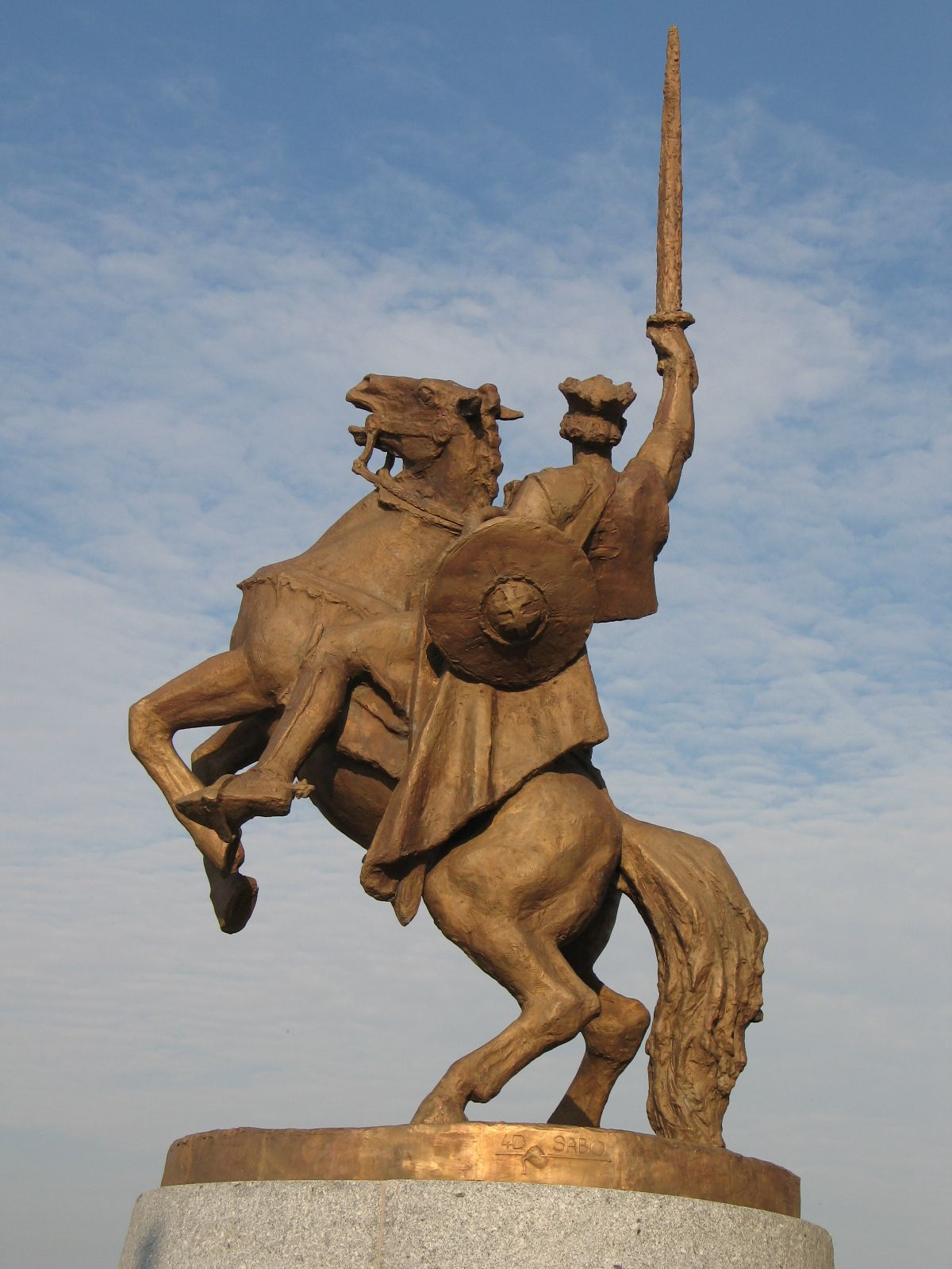 Bronzová plastika Svätopluka I. so žulovým podstavcom je vysoká 7,8 m.